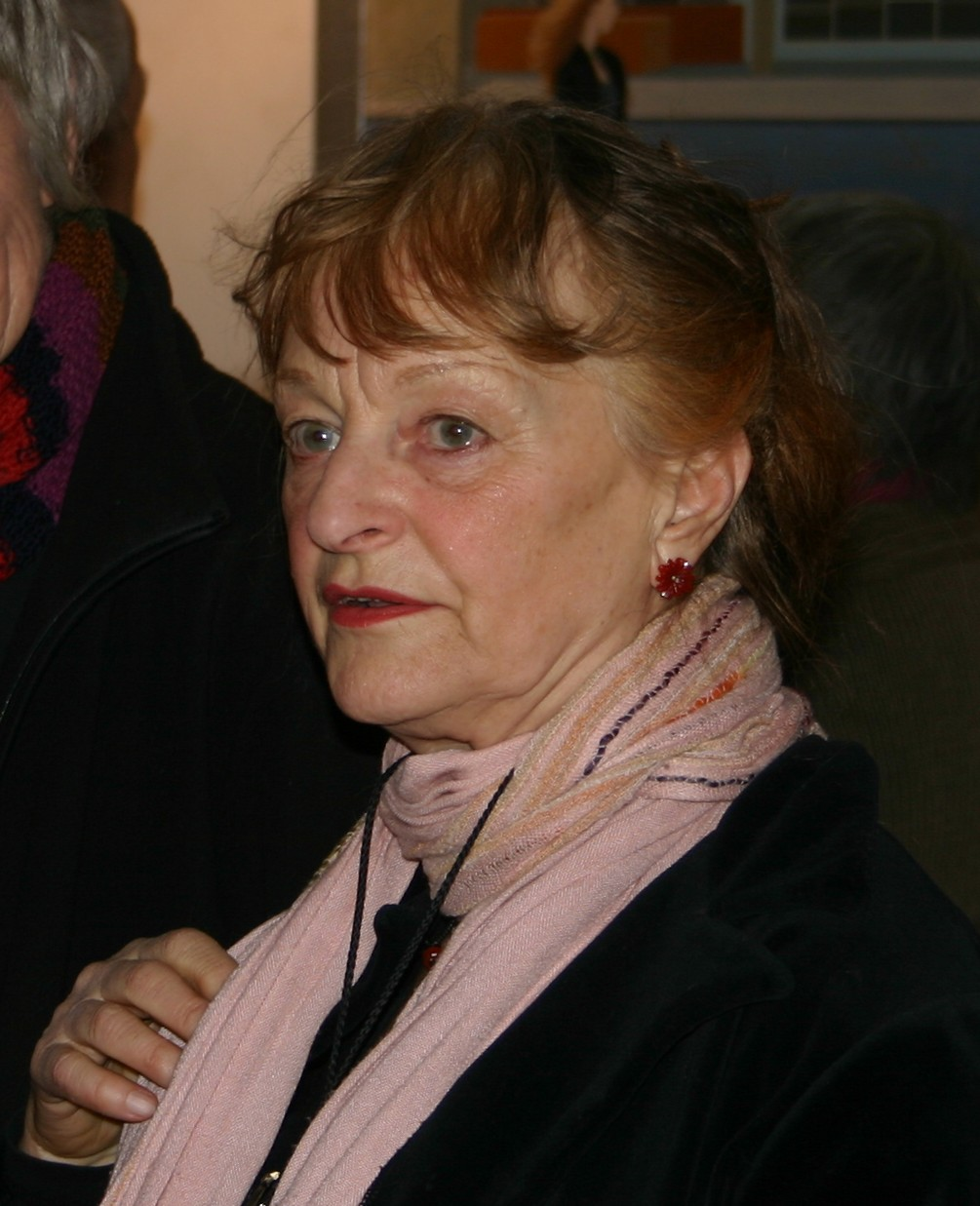 Die Fotografin Helga Paris während einer Ausstellungseröffnung in Berlin.